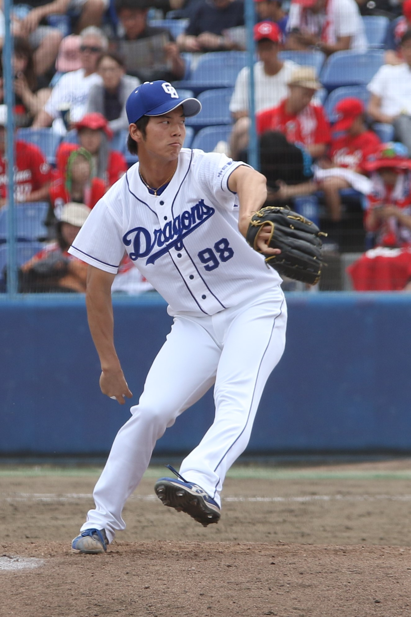 2019年6月23日、ナゴヤ球場にて